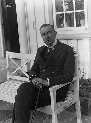 Norwegian writer Vilhelm Krag.